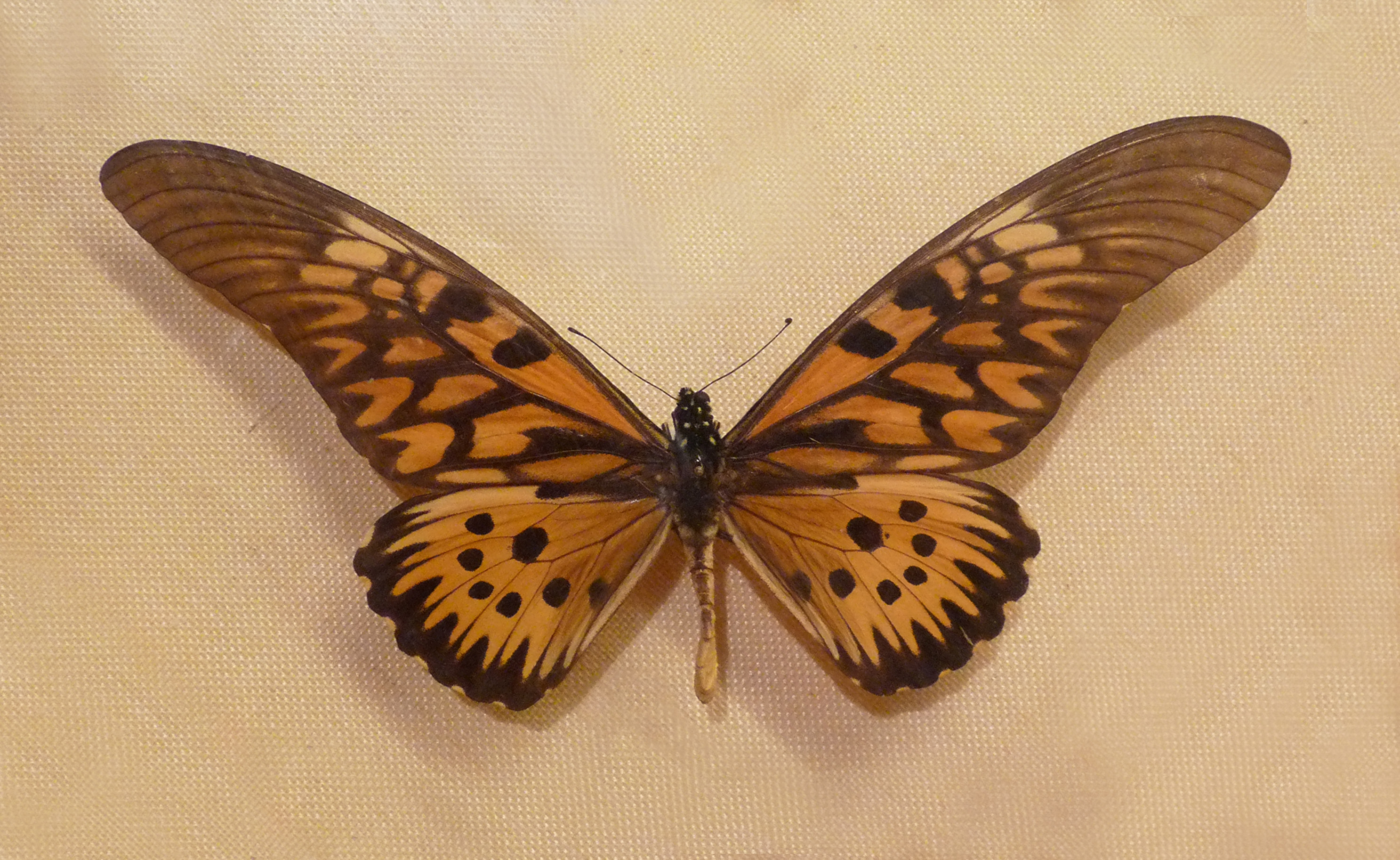 Papilio antimachus Drury, 1782 (Centrafrique) au Musée zoologique de Strasbourg